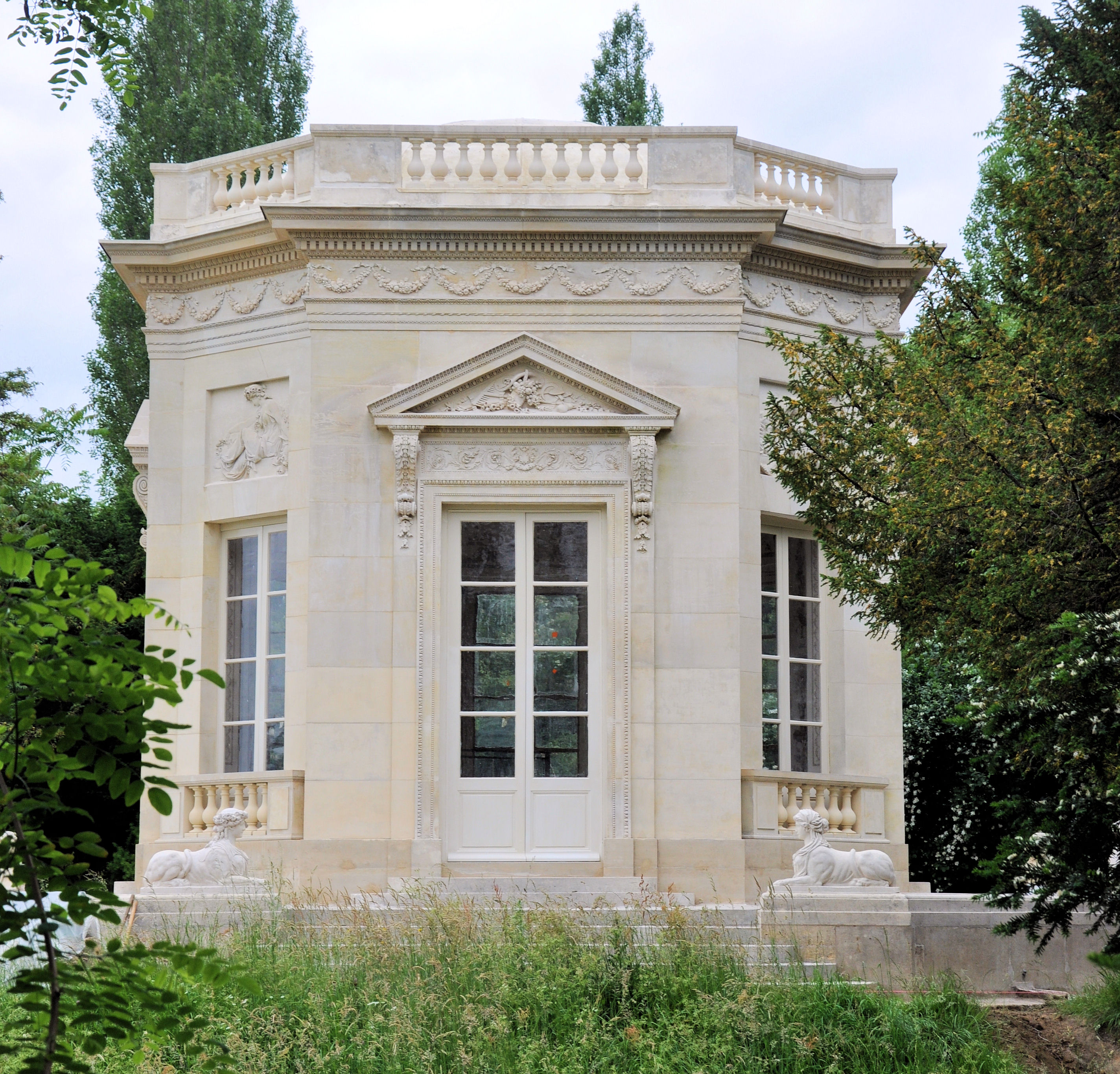 Petit Trianon - Belvédère